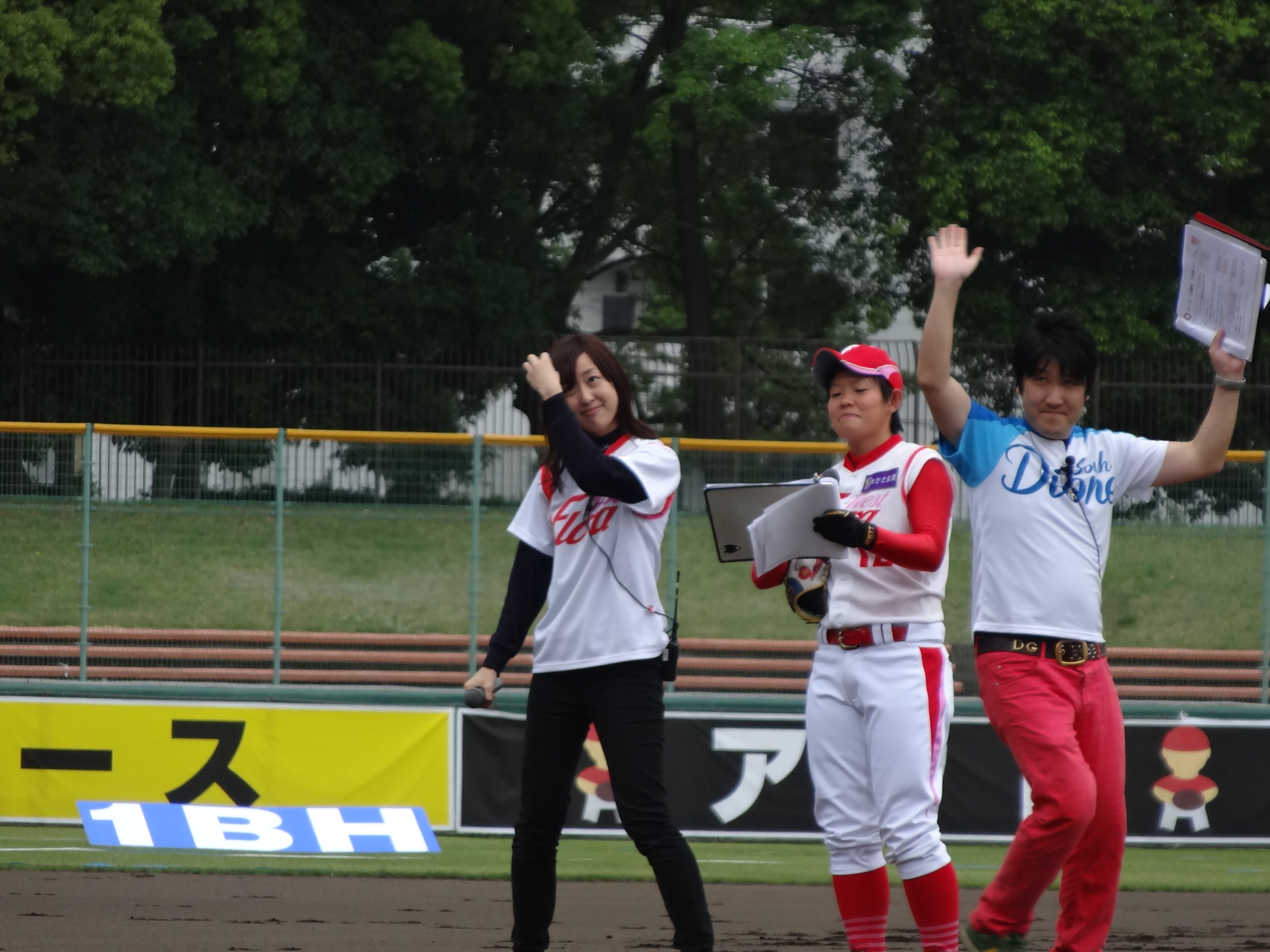 婚活リアル野球盤対決！女子プロ野球vs独身脱出JAPAN わかさスタジアム京都を占拠せよ！